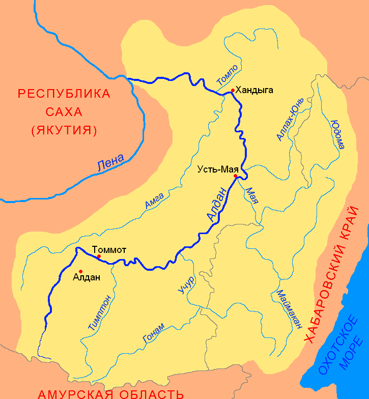 no original description